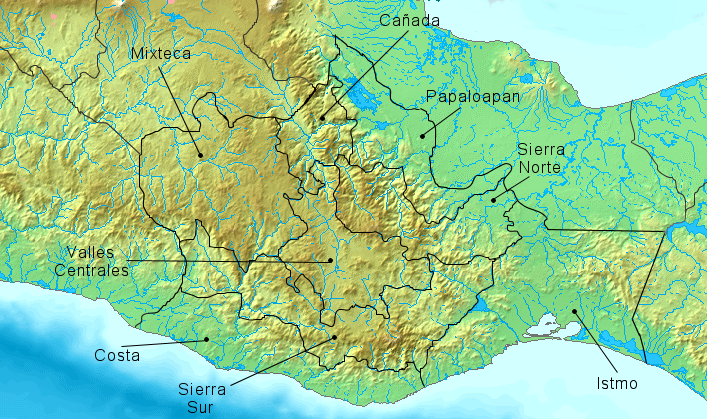 Mapa físico de Oaxaca, con divición Socio-Cultural